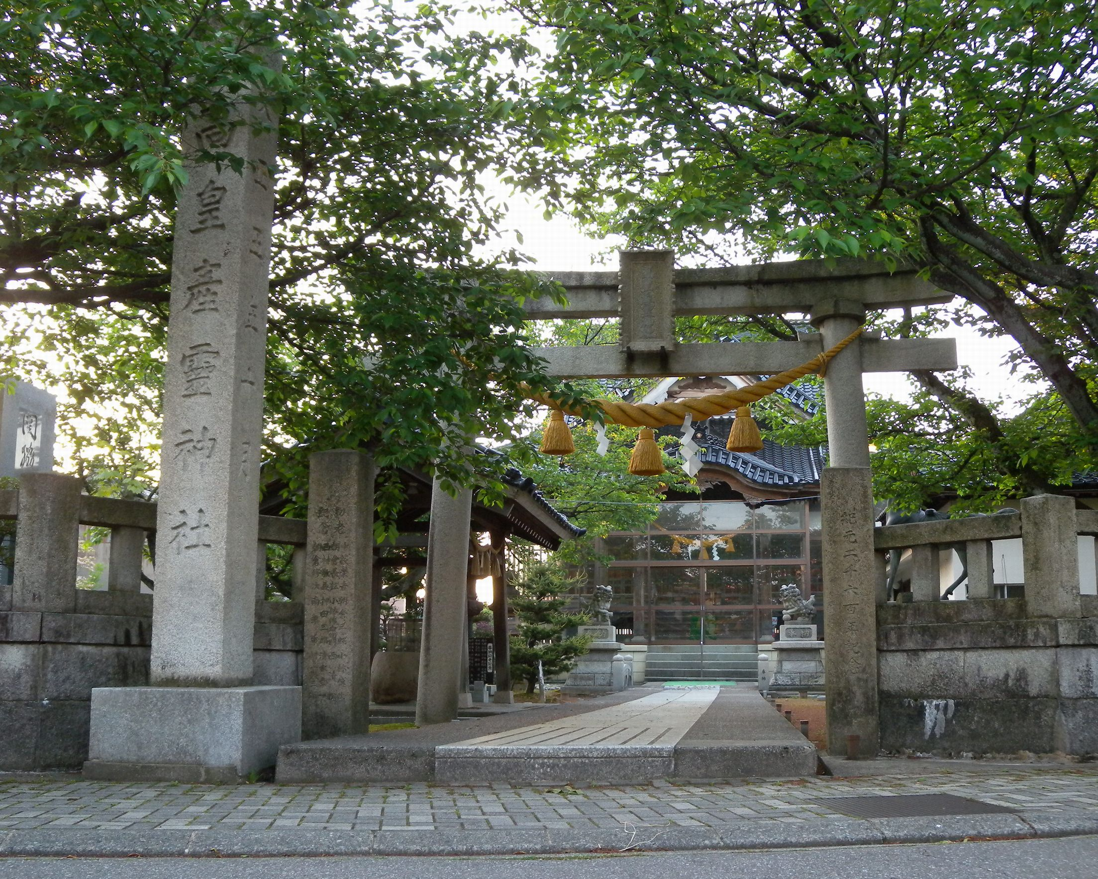 高皇産霊社前景